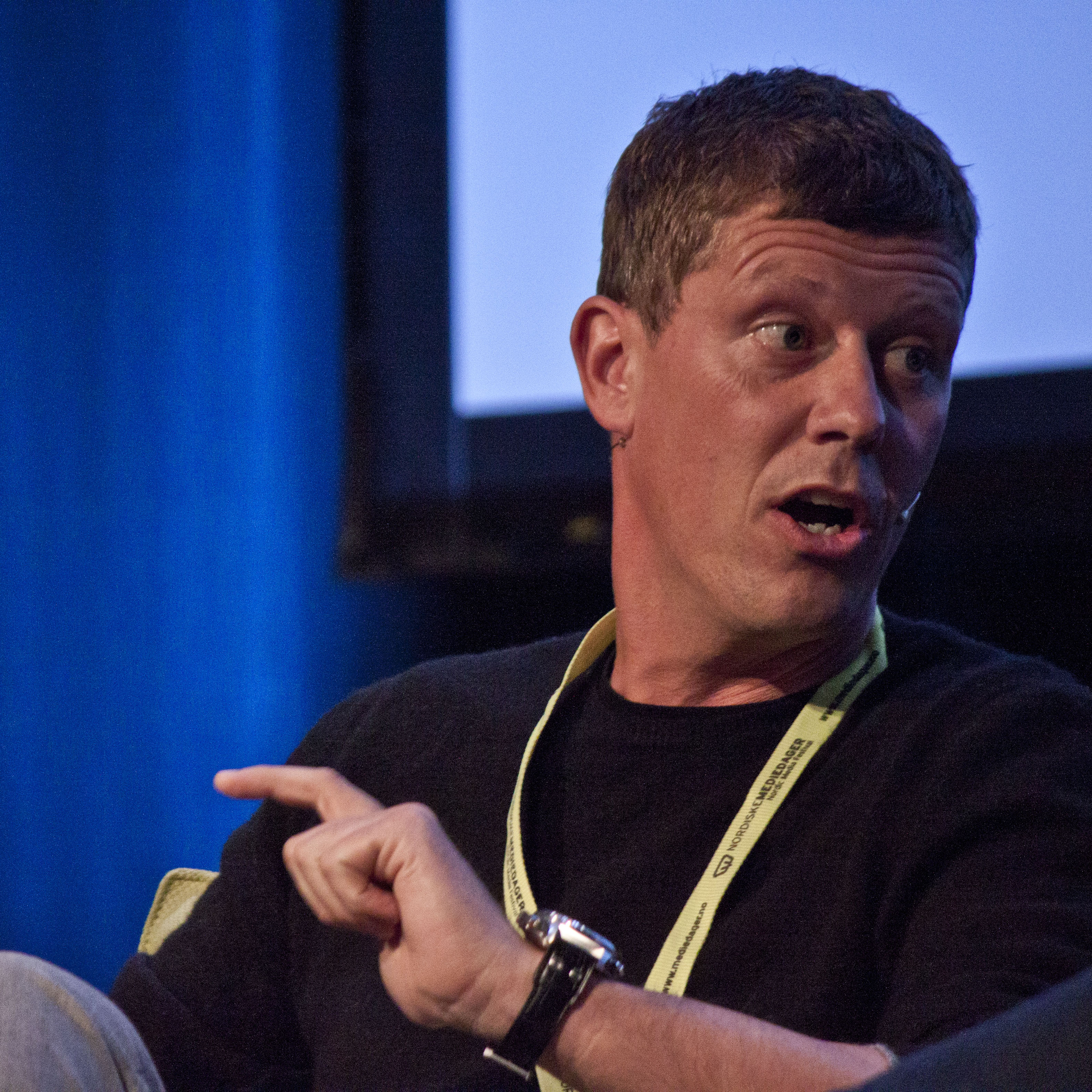 Nordiske Mediedager 2013